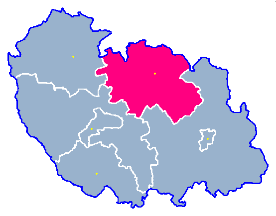 Locator maps for communes in województwo zachodniopomorskie : Rąbino gm.png (podział na gminy)